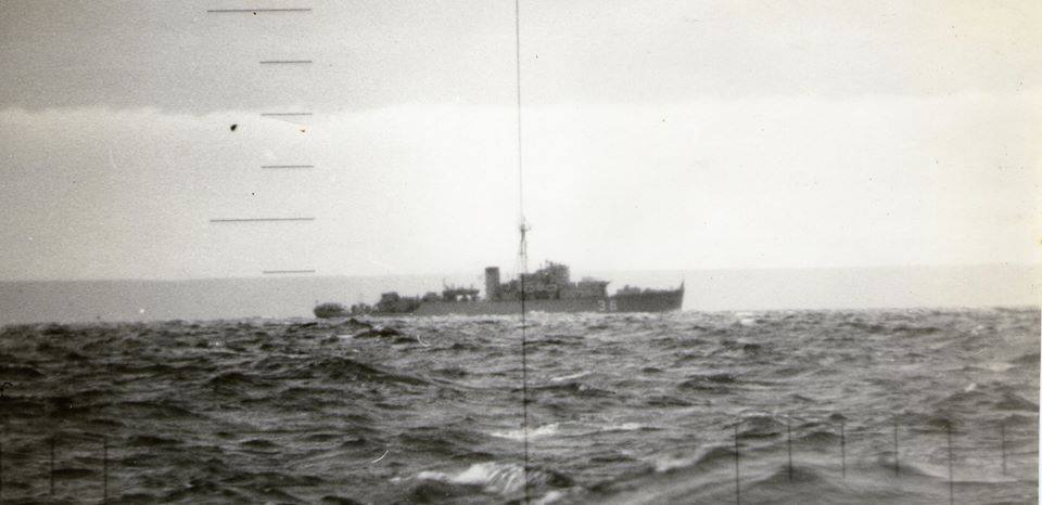 ARA Piedra Buena (P-36) vista a través del periscopio de ataque del sumergible clase Balao ARA Santiago del Estero (S-12)